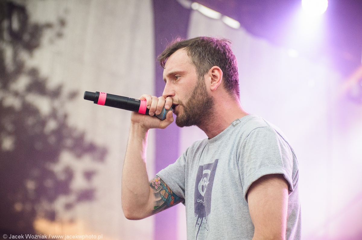 Polish rapper Małpa